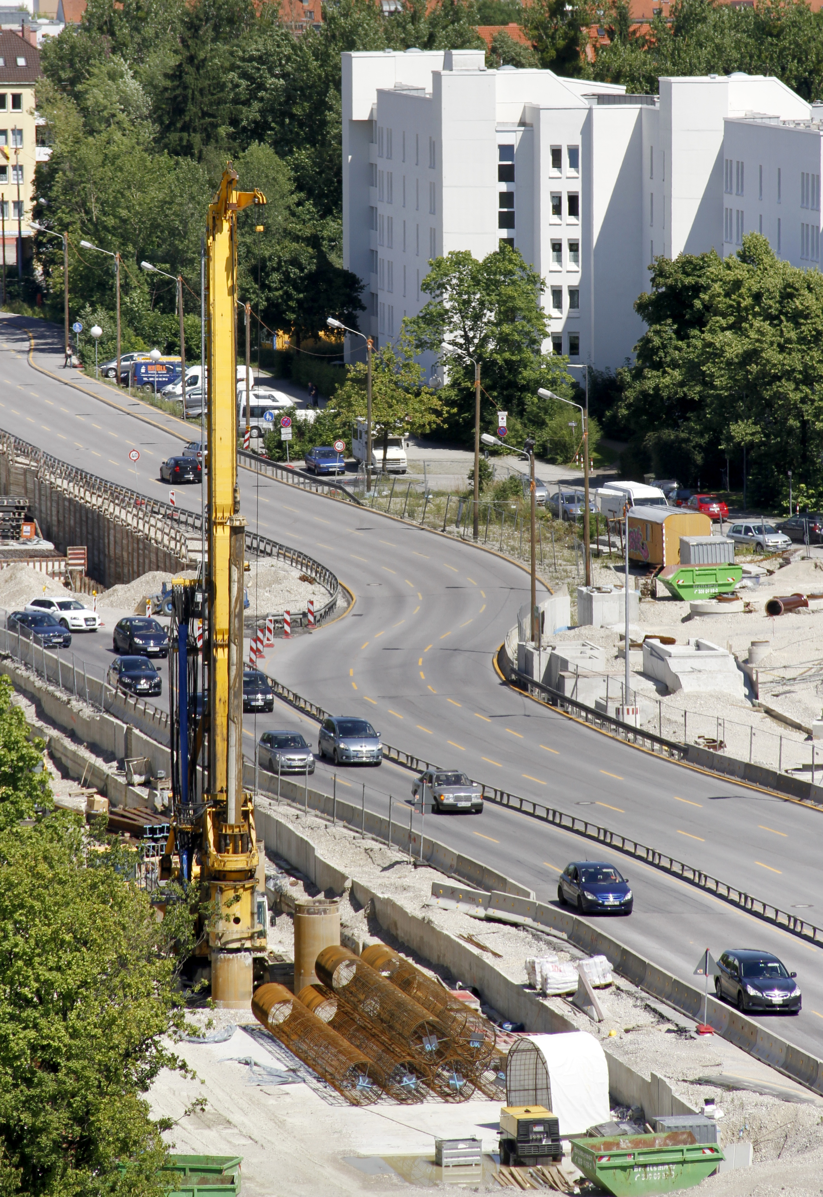 Tunnelbauarbeiten an der Heckenstallerstraße, München. Im Zentrum ein Bohrpfahlgerät, davor Bewehrungskörbe